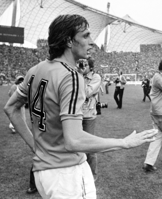 Finale wereldkampioenschap voetbal 1974 in Munchen, West Duitsland tegen Nederland 2-1; Cruyff verlaat het veld